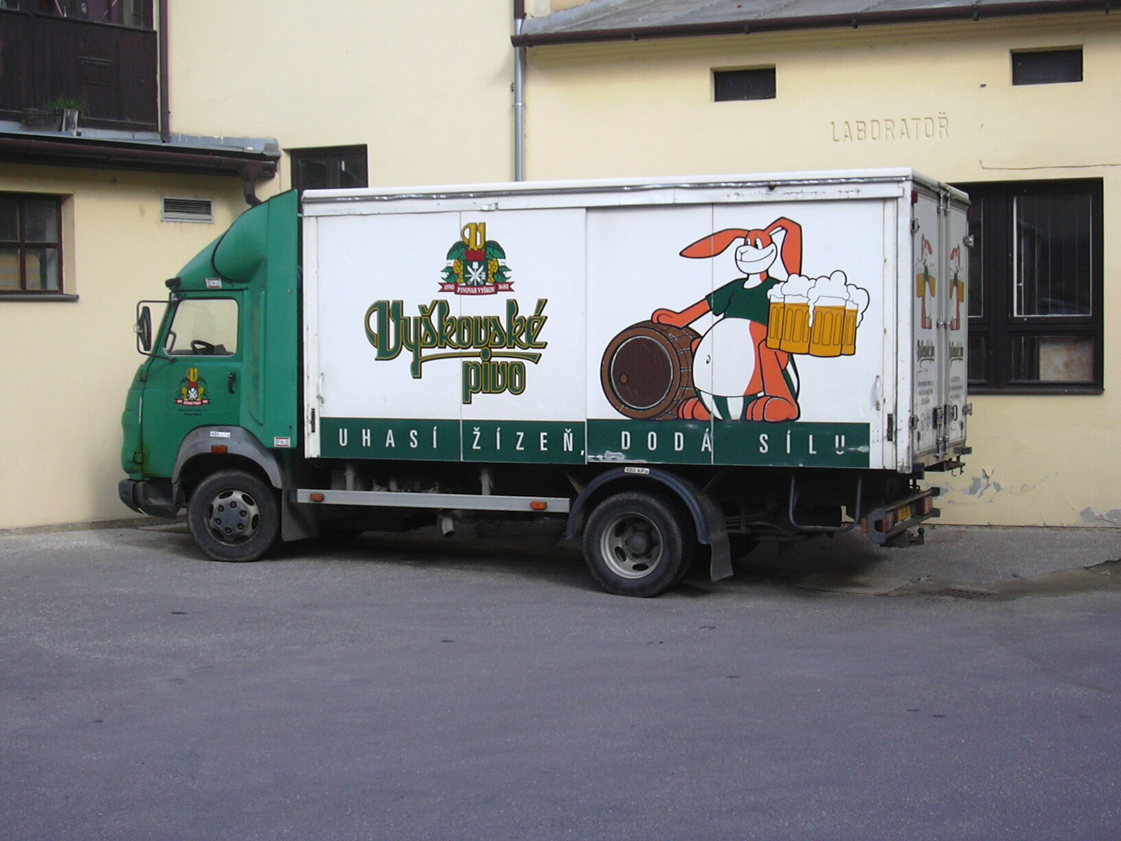 Avia pivovaru (Vyškov- czech republic)